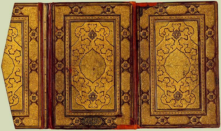 Книж. обложка Исфахан ок.1600 Метополитен